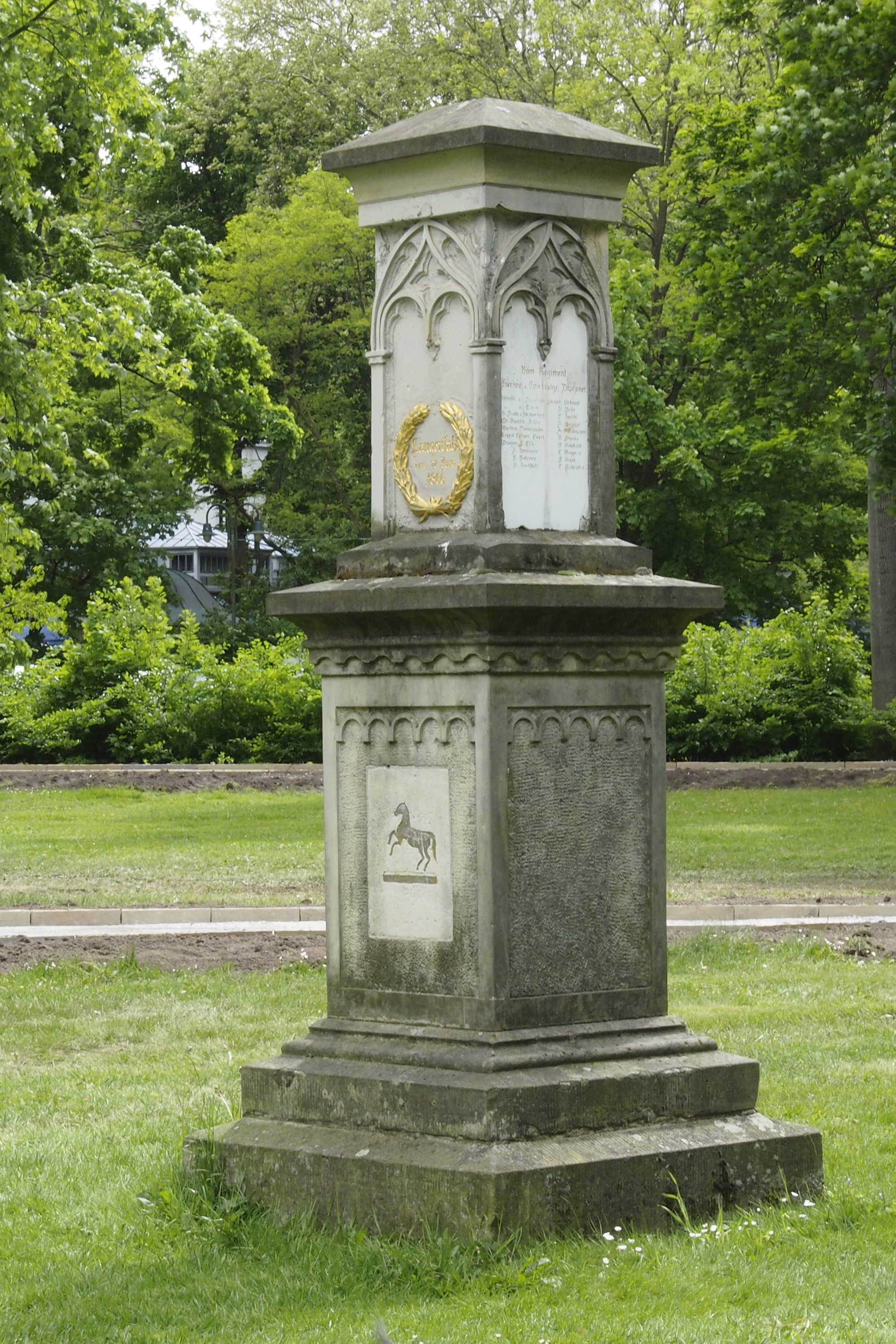 Denkmal im Französischen Garten Celle (Niedersachsen) zur Erinnerung an die Schlacht bei Langensalza (1866), Das Denkmal wurde 1869, einen Tag nach seiner Aufstellung, zerstört und 1920 wieder aufgebaut.